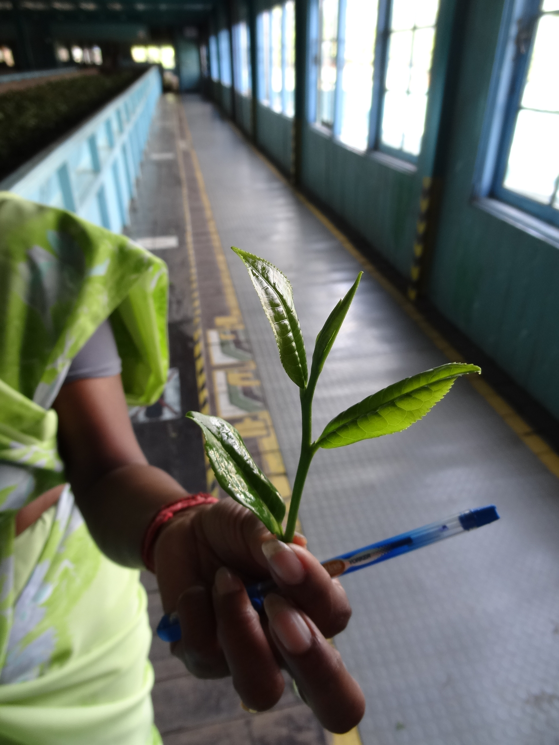 Glenloch tea factory